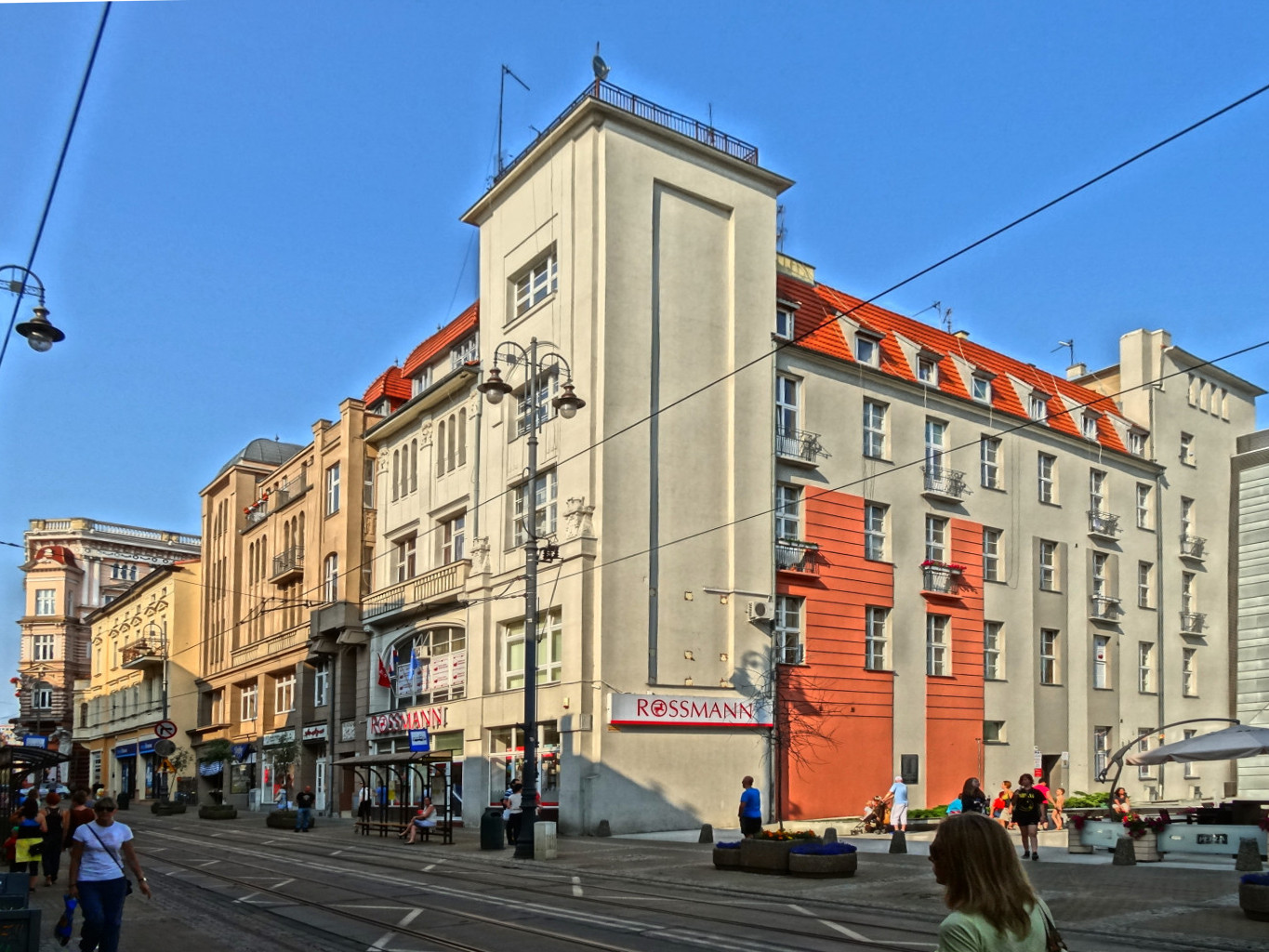 Kamienica przy ul. Gdańskiej 10 w Bydgoszczy